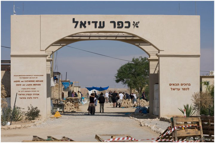 כניסה לכפר הסטודנטים עדיאל